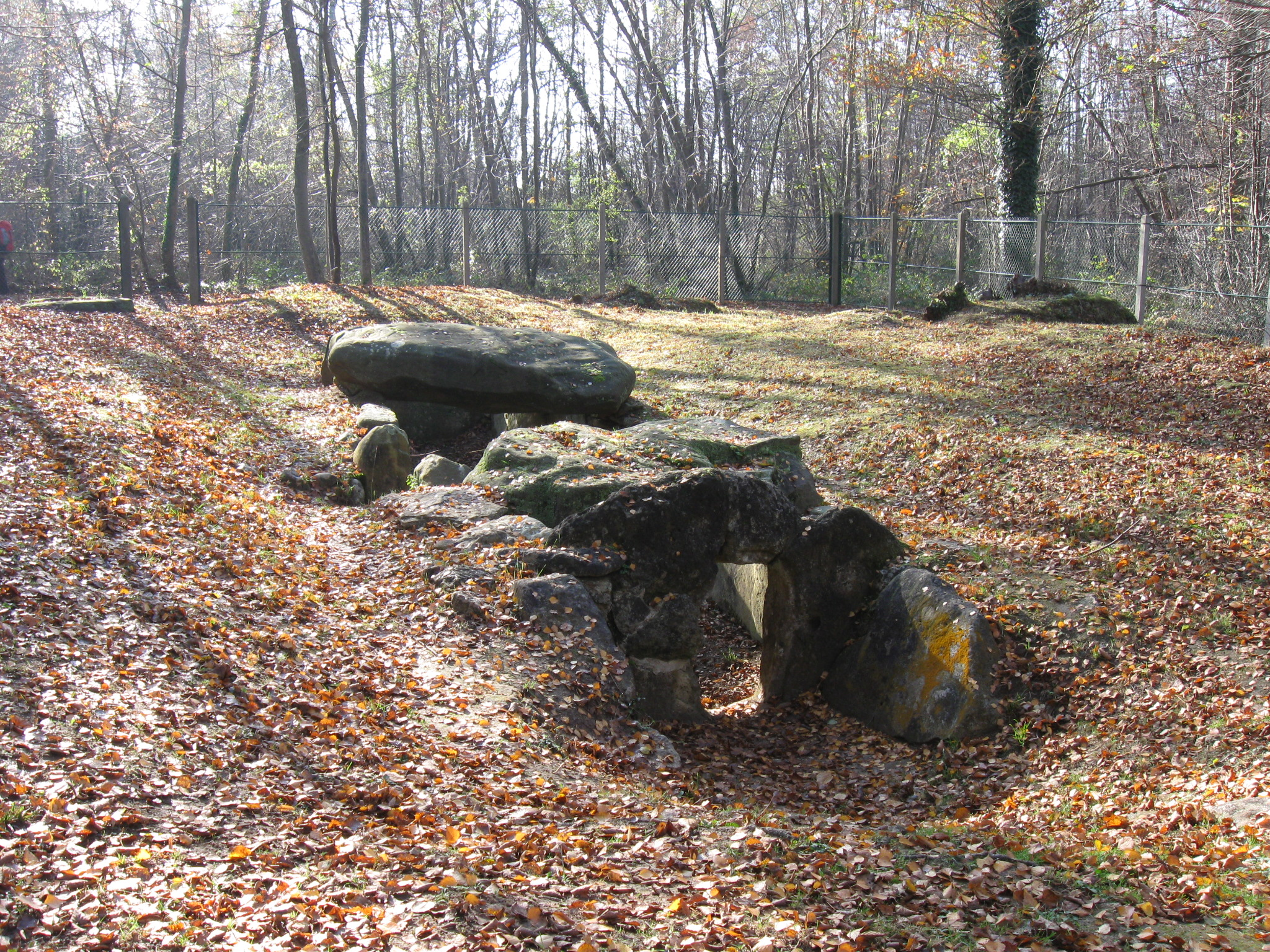 L'allée couverte de la Pierre Plate à l’orée de la forêt de l’Isle Adam (Presles, Val d'Oise).